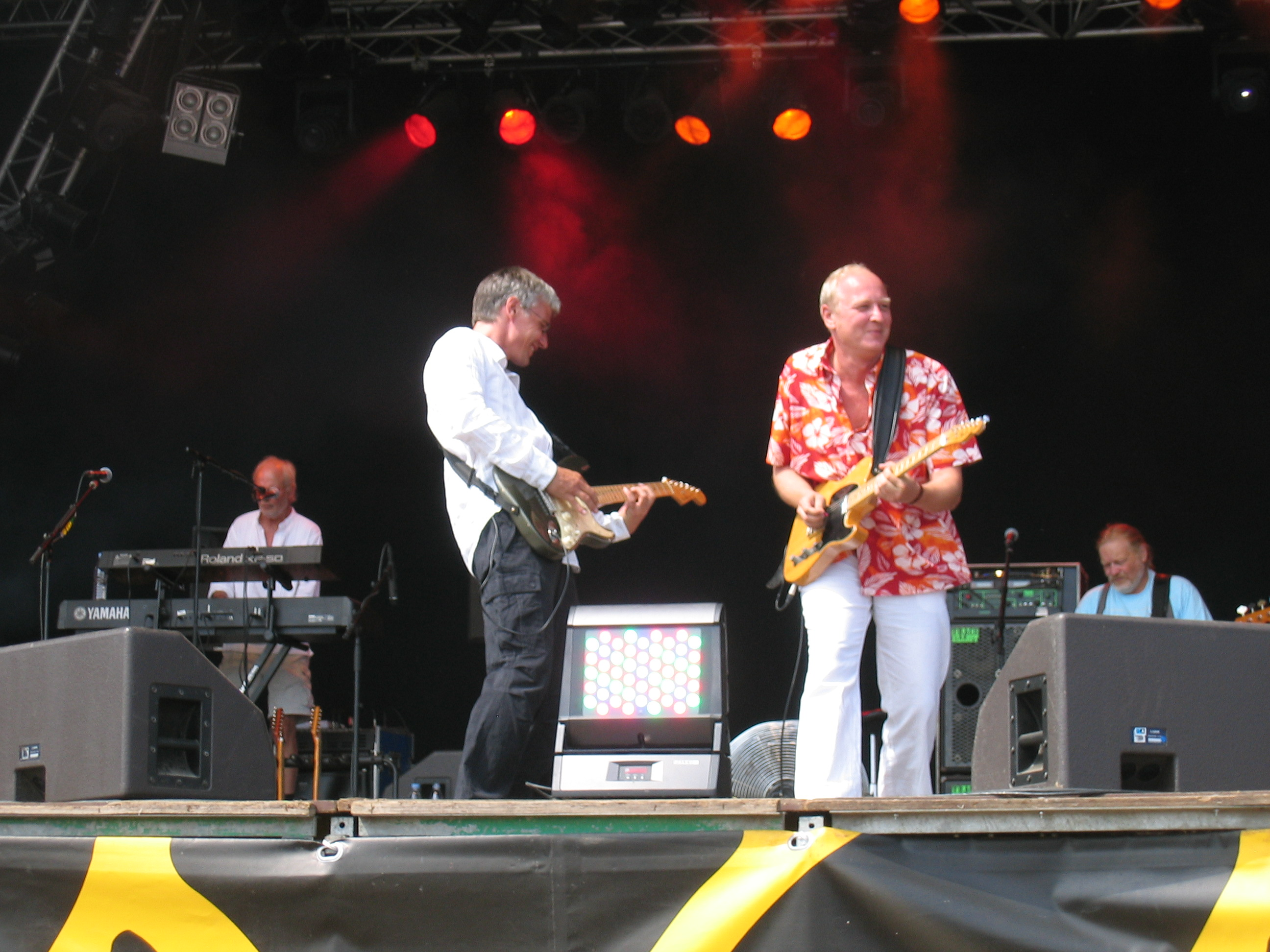 Jes Kerstein and Peter Bødker from Bamses Venner performing at Langelandsfestivalen 2006. Picture by User:Lhademmor